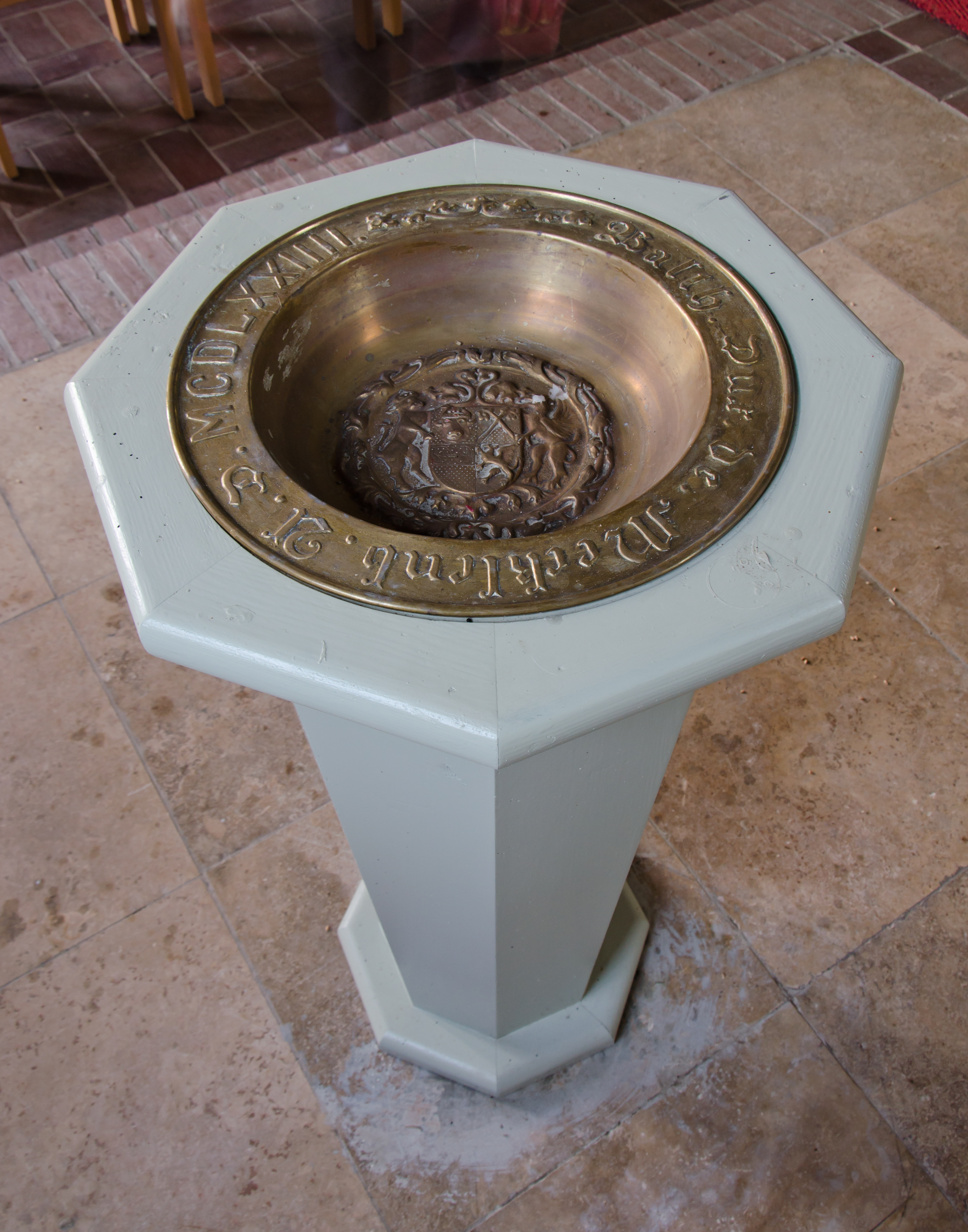 Langen Trechow Kapelle Tauffünte